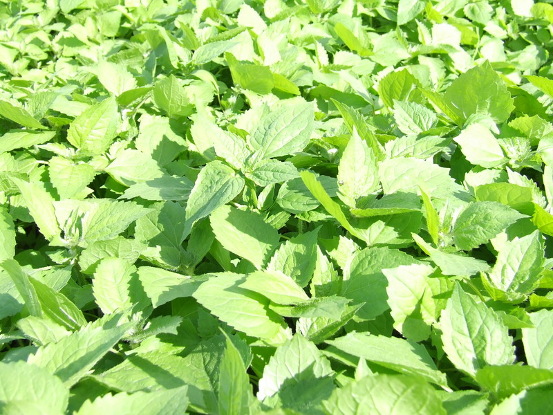 Galinsoga parviflora. Dasiūnai, Kaunas district, Lithuania.